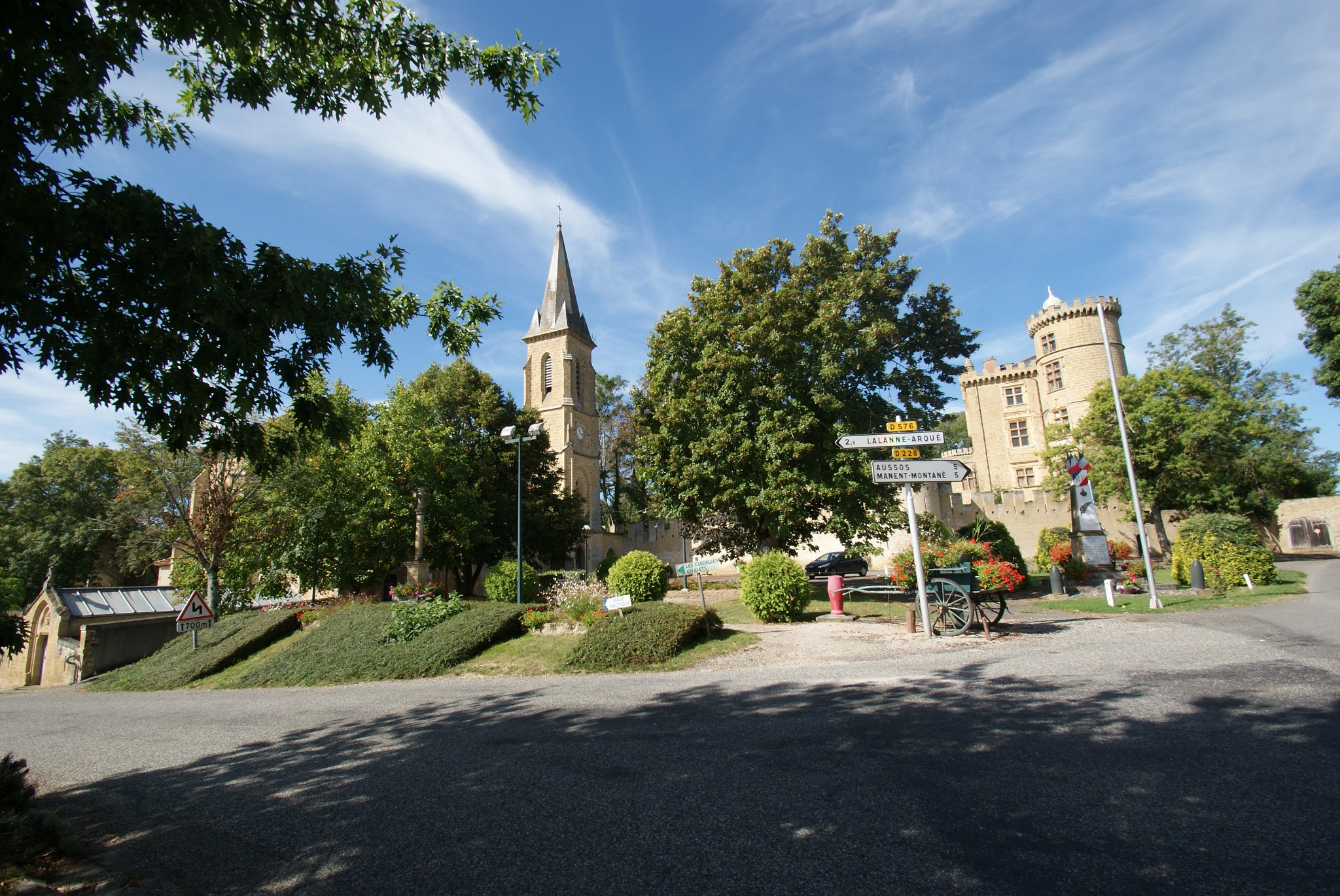 Het dorpscentrum van Saint-Blancard (Gers, Frankrijk).